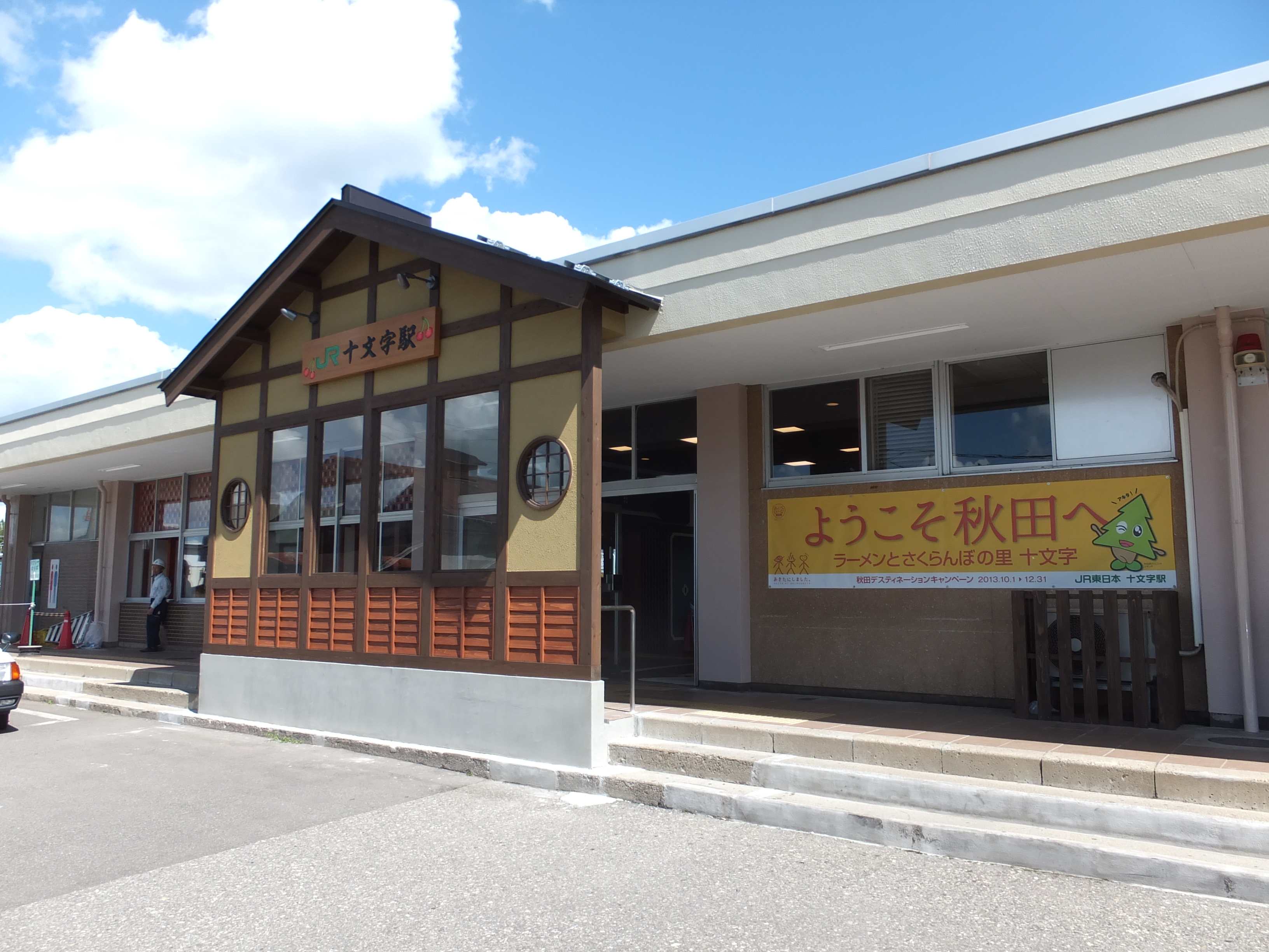 奥羽本線十文字駅（秋田県横手市）。2013年10月から始まるディスティネーションキャンペーンに合わせ、駅舎の改装が行われた。